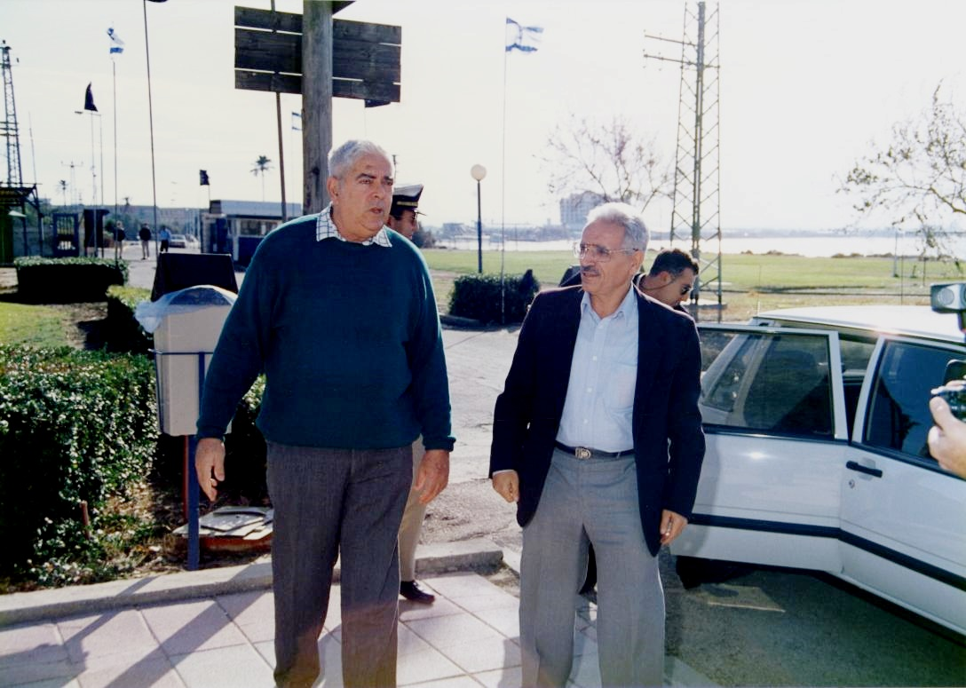 שר התחבורה ישראל קיסר מתקבל בבית הספר על ידי זאב אלמוג